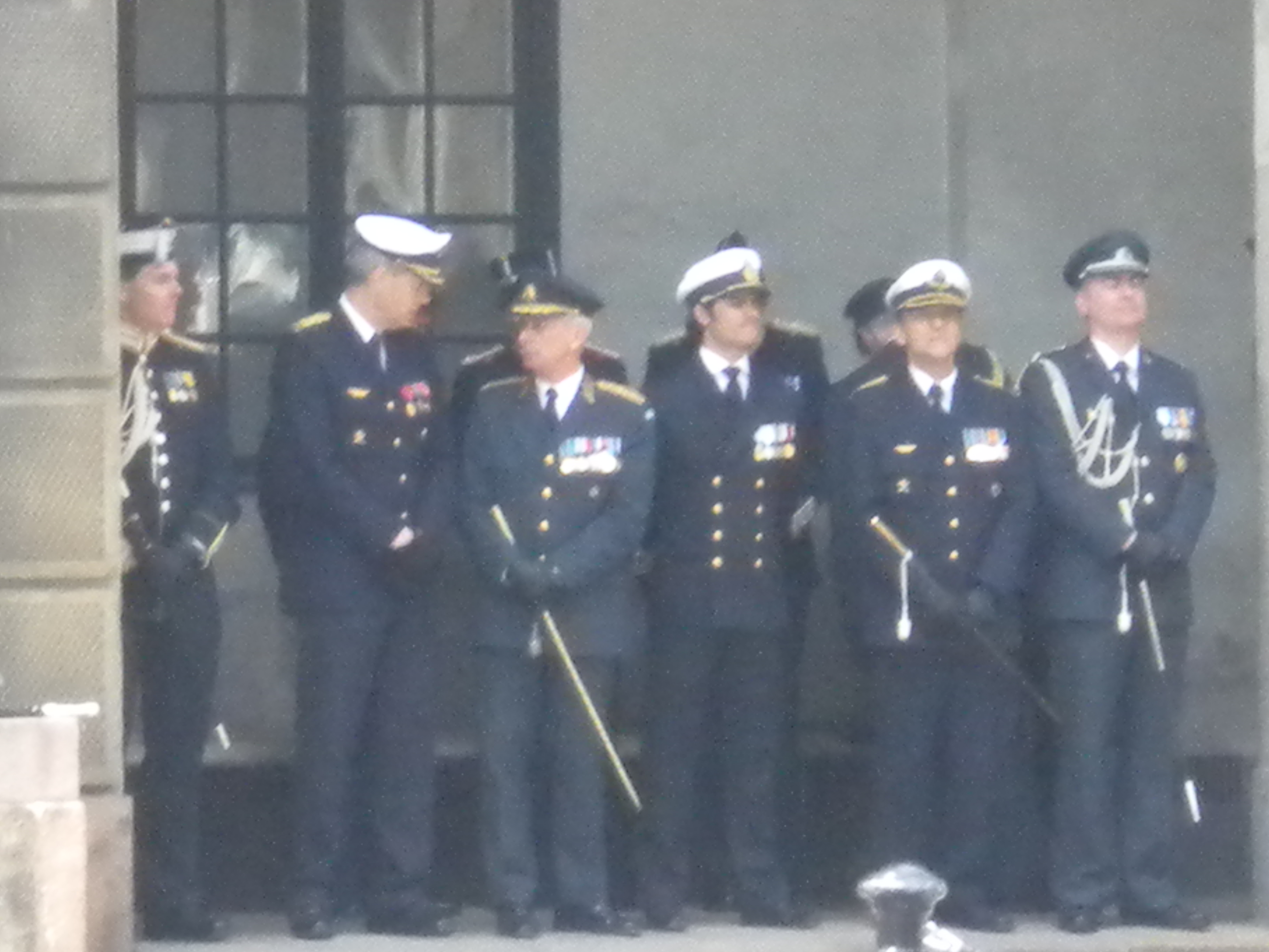 Överbefälhavaren General Sverker Göransson och Prins Carl Philip med flera vid högvaktsavlösning på kungliga slottet nationaldagen 2012.